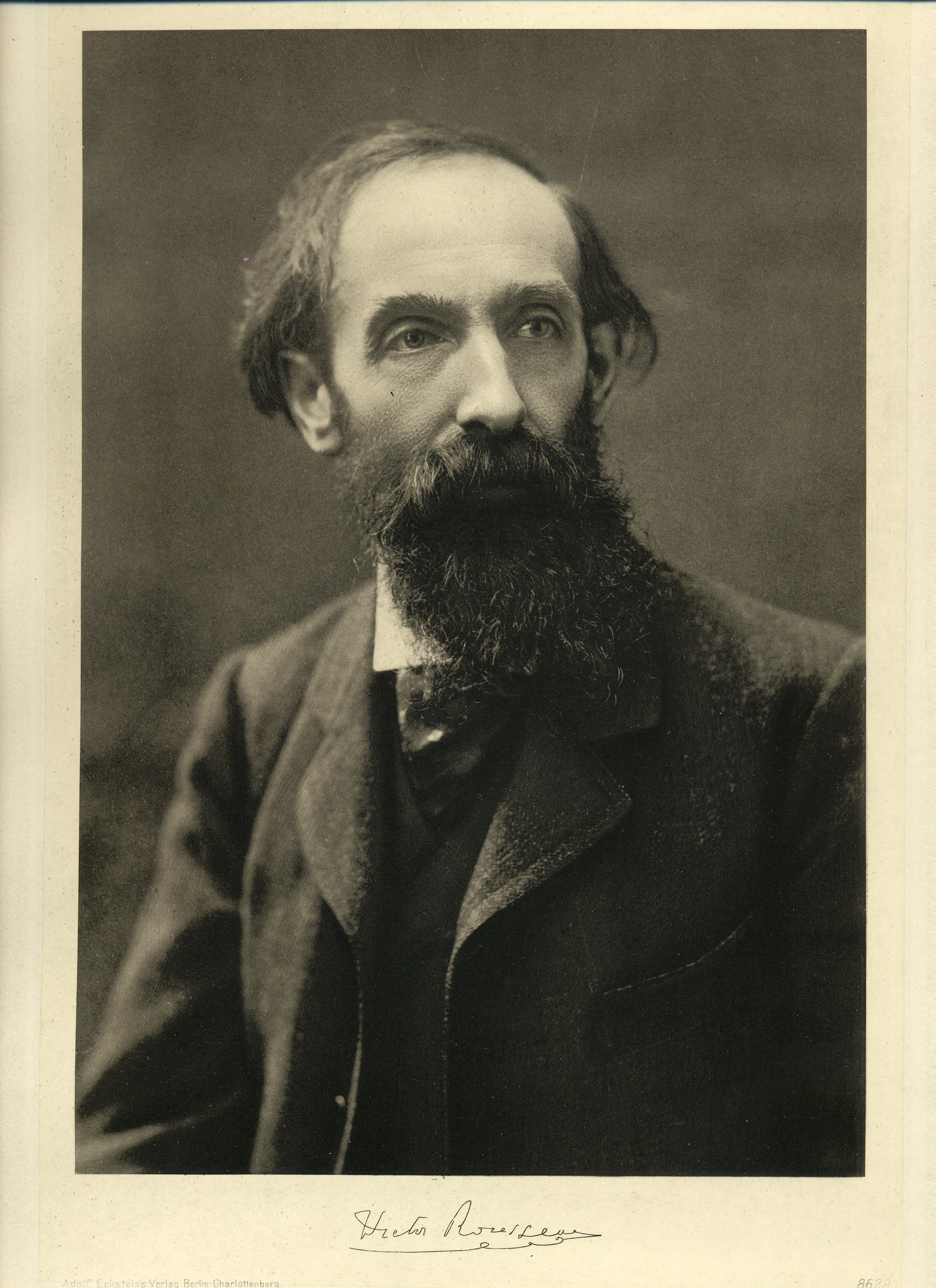 Portrait de Victor Rousseau vers 1900 paru dans "La Belgique d'aujourd'hui", sous la direction de Gustave DELTOUR, Berlin-Charlottenburg, Adolf Eckstein, vers 1908.